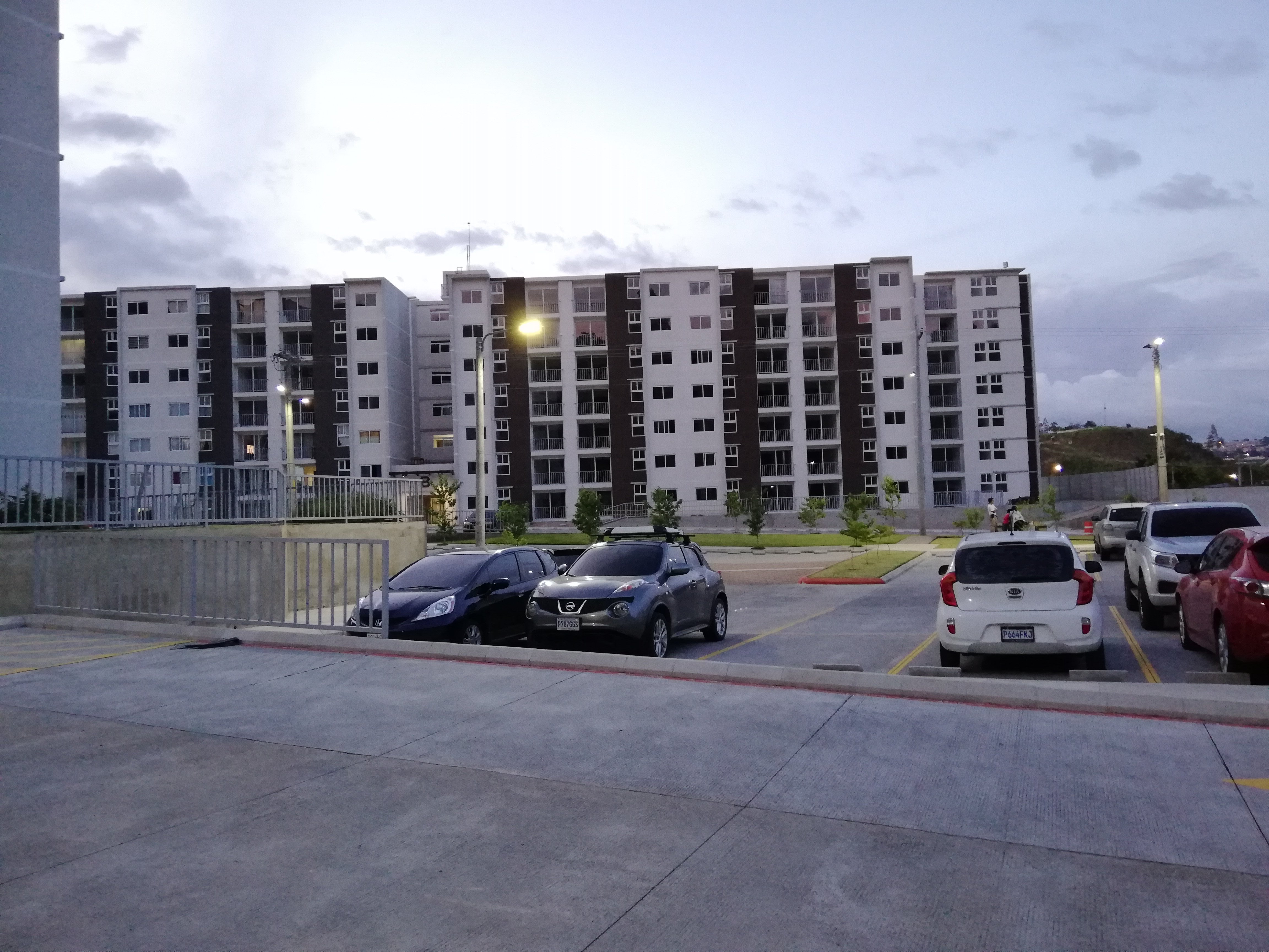 Apartamentos en Zona 5 de Villa Nueva